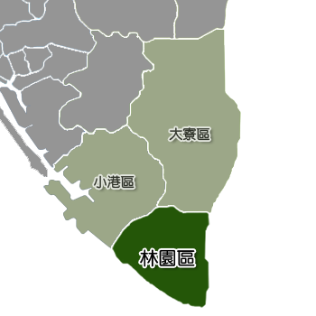 林園區相對位置